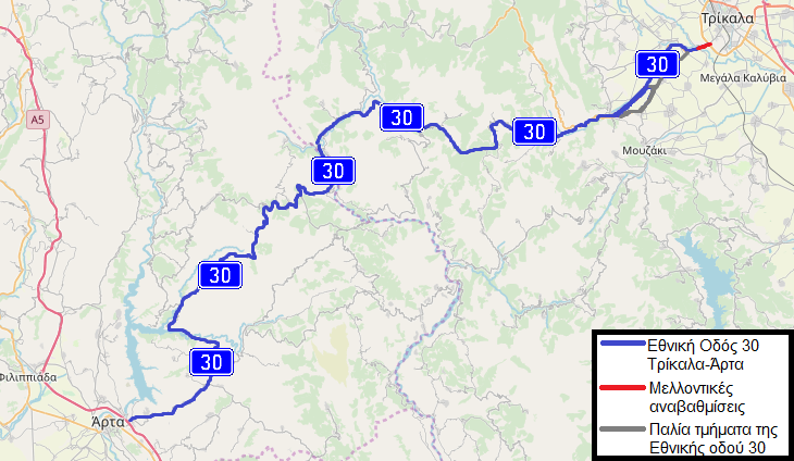 Ο χάρτης του τμήματος Τρίκαλα-Άρτα της Ε.Ο. 30 This map may be incomplete, and may contain errors. Don't rely solely on it for navigation.